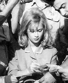 Алики Вуюклаки даёт автограф